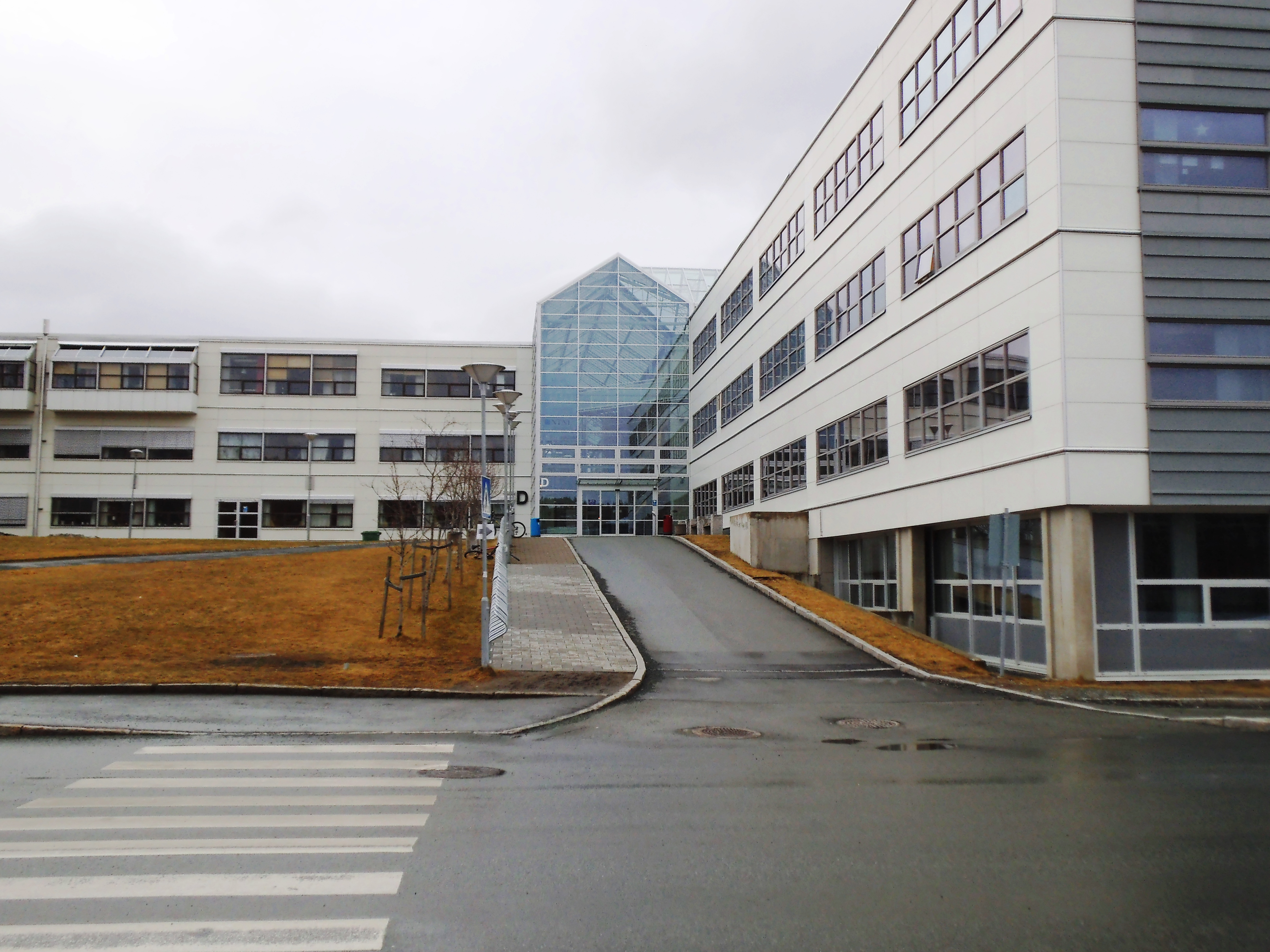 Hovedinngangen ved NTNU Dragvoll.